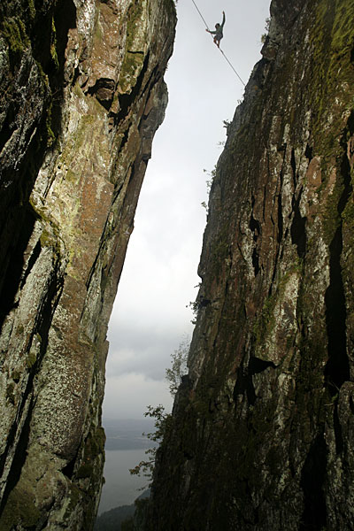 Photo perso d'un highline